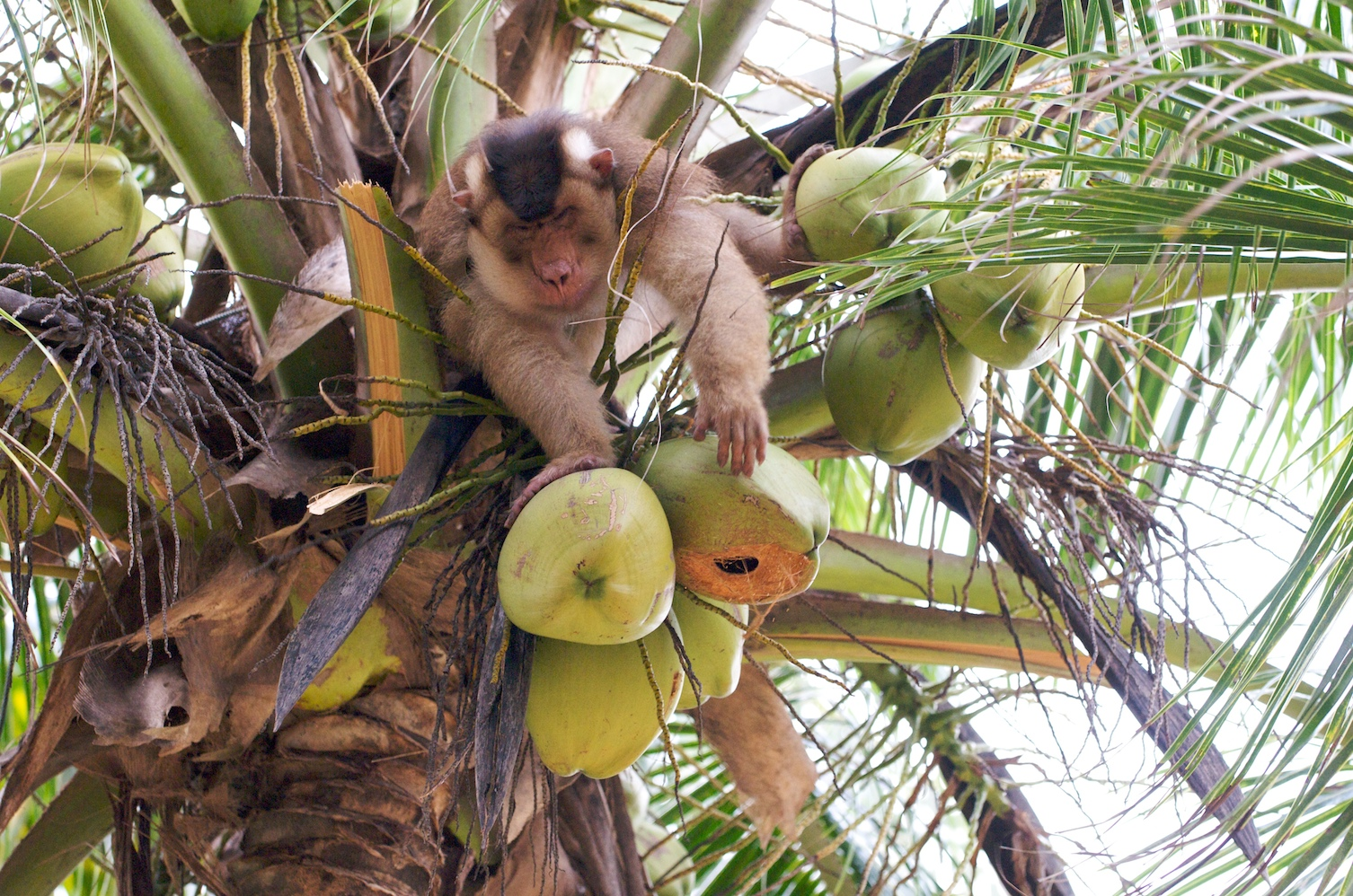 Malaysia